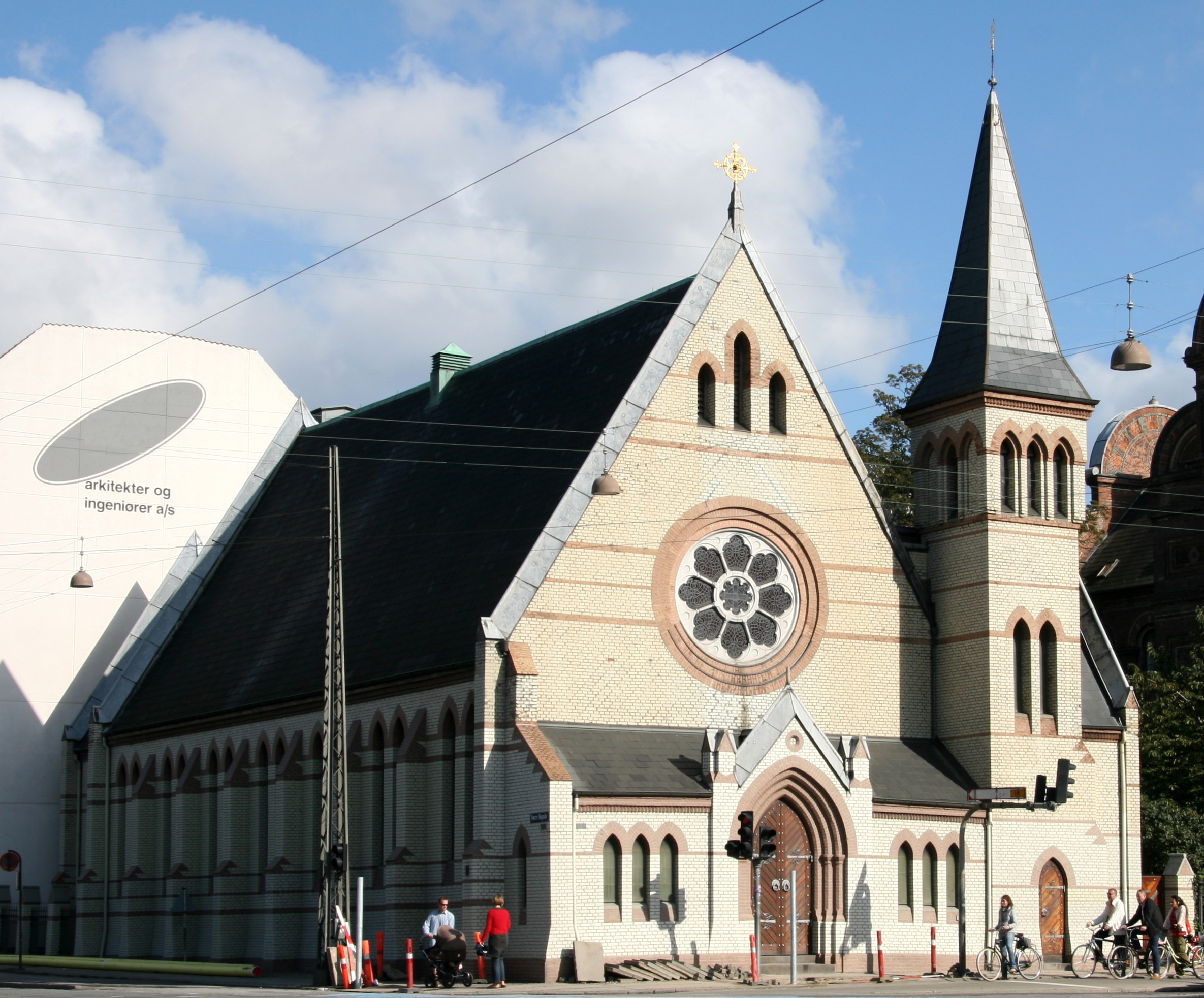 Katolsk Apostolisk Kirke in Copenhagen, Denmark